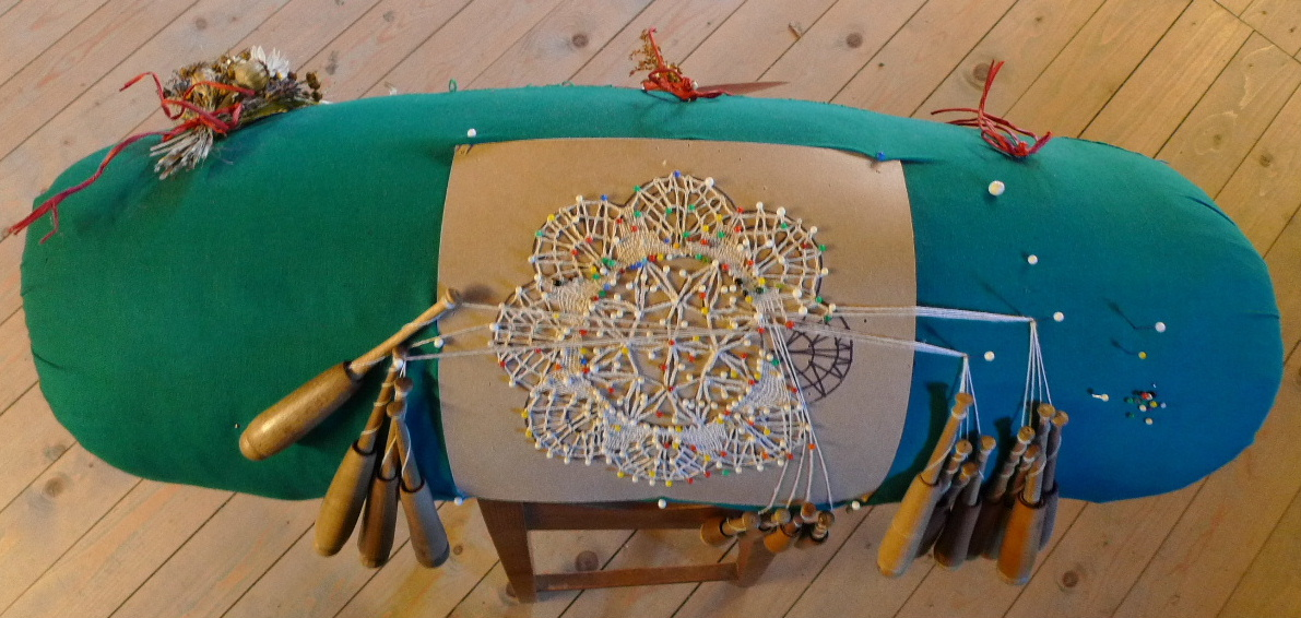 Klöppelkissen - Fundort: Turm der St.-Annen-Kirche